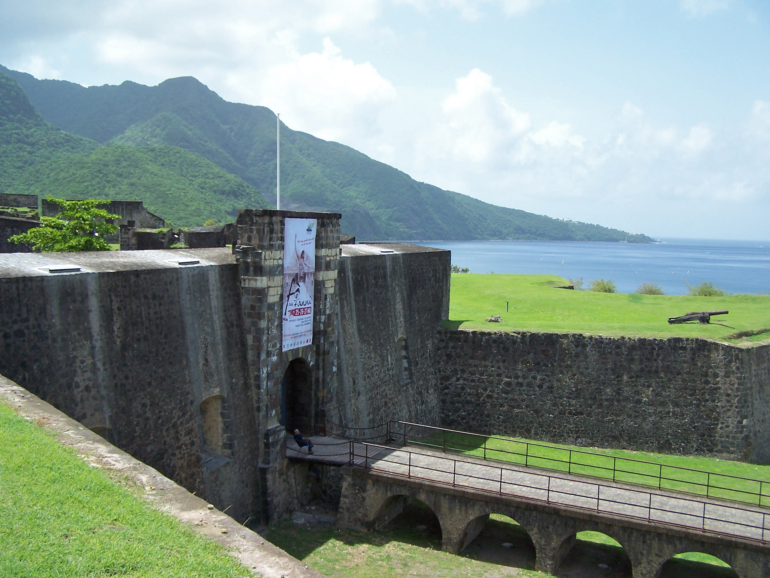 Entrée du fort Delgrès et monts Caraïbes dans le fond. (Basse-Terre, Guadeloupe)